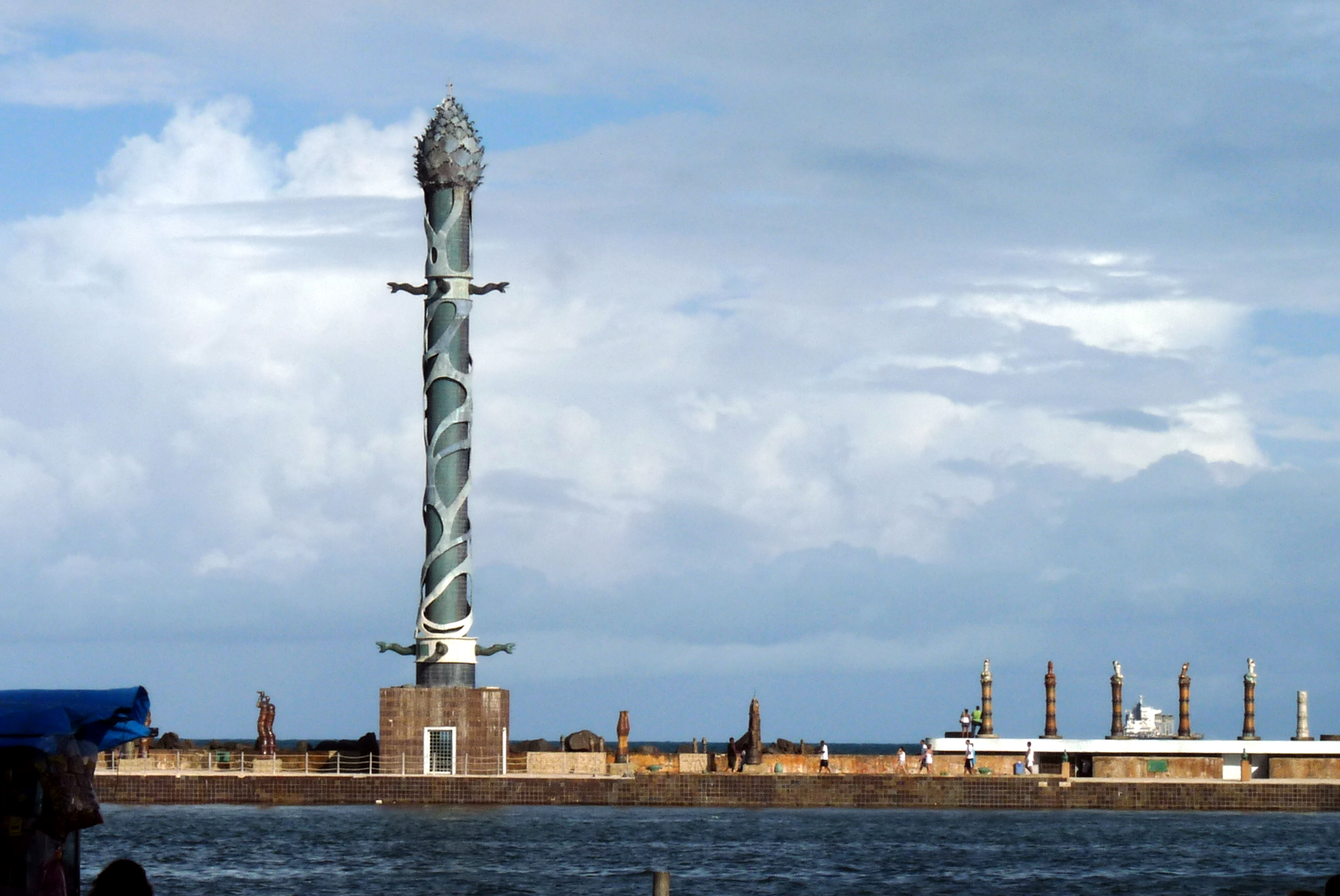 Torre de Cristal - Recife - Pernambuco - Brasil